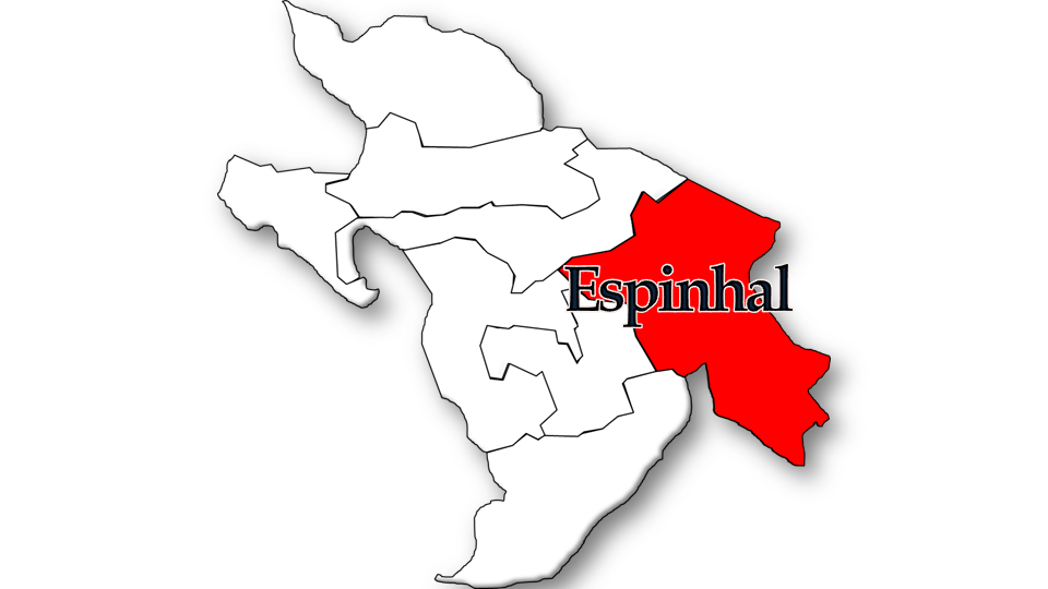 População